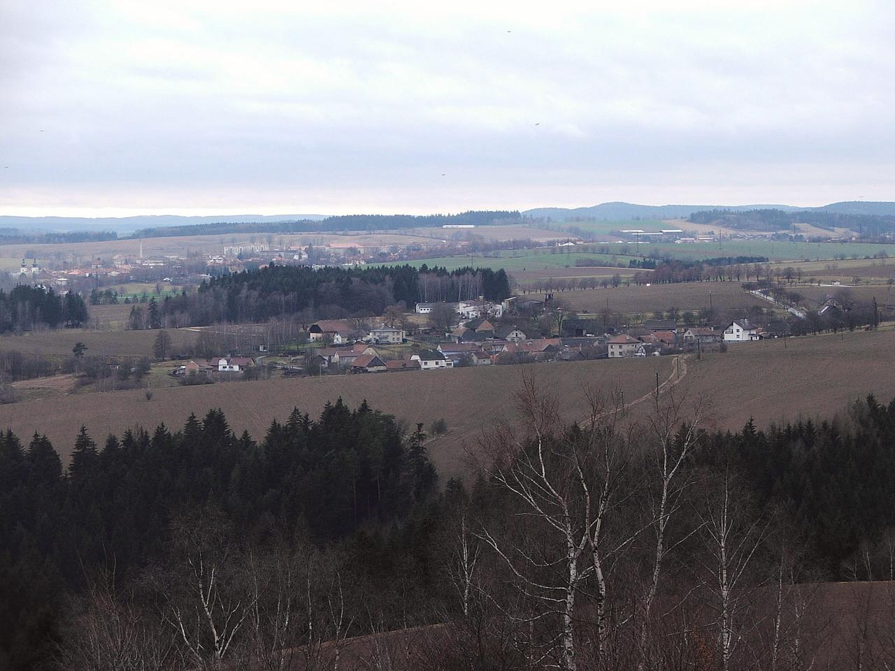 Dvořiště u Bystřice nad Pernštejnem přes údolí říčky Bystříce